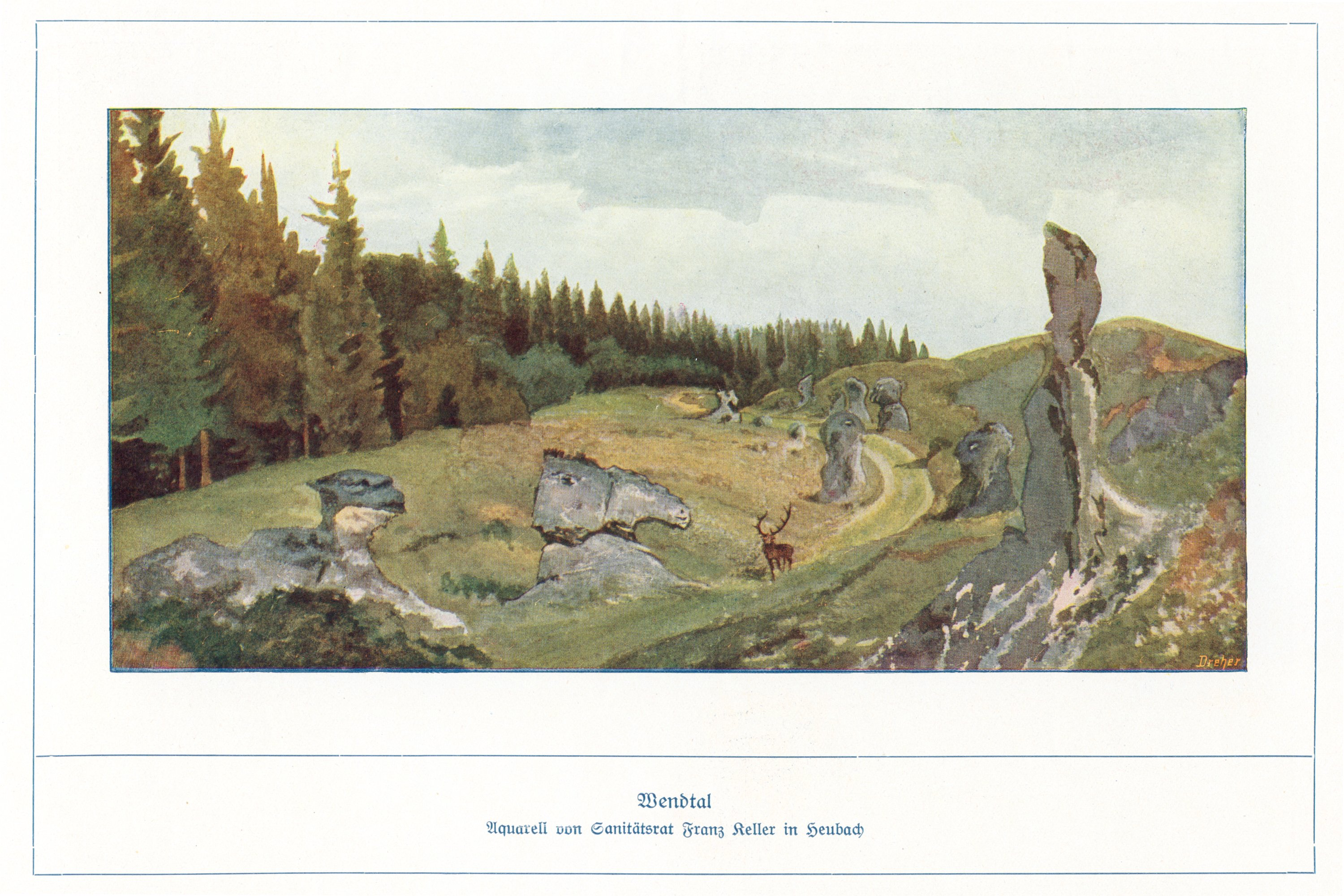 Wendtal Aquarell von Franz Keller in Heubach / Heutige Schreibweise: Wental / siehe auch: Feldinsel Klösterle